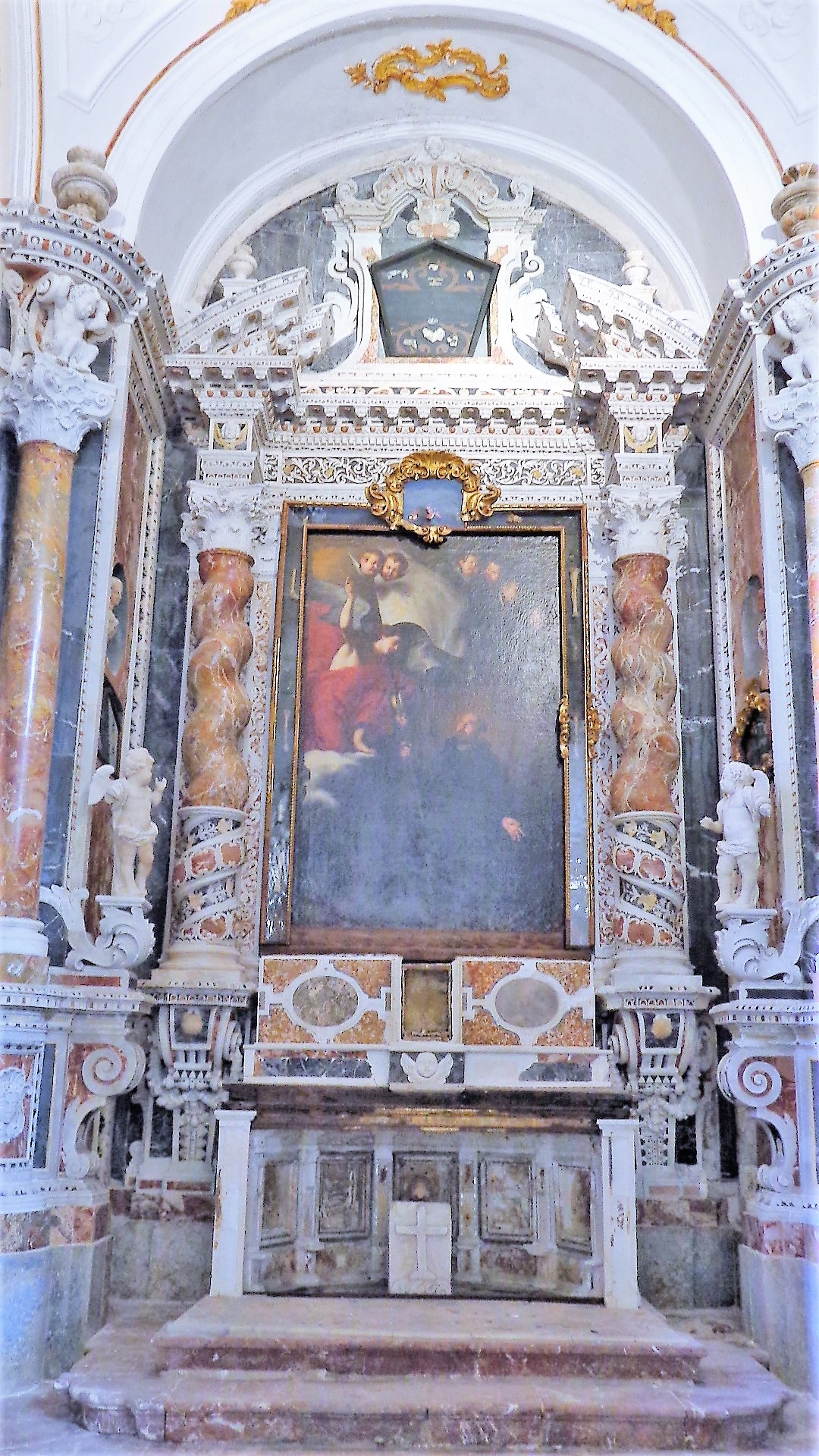 Altare minore